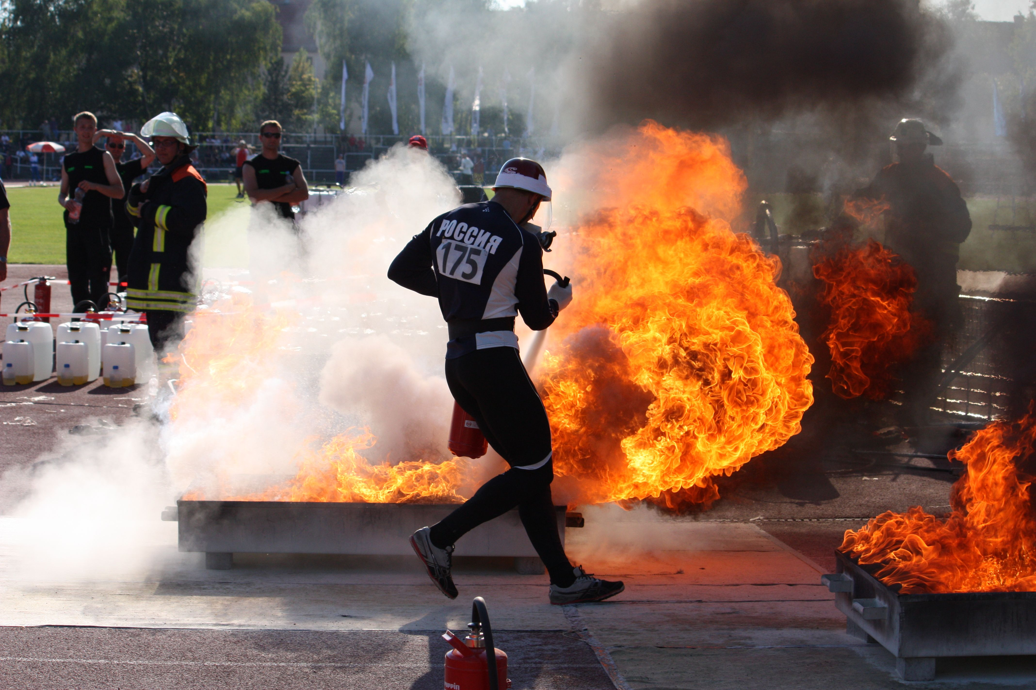 Löschen des Feuers bei der 4x100-Meter-Feuerwehrstafette bei der 7. WM im Feuerwehrsport in Cottbus